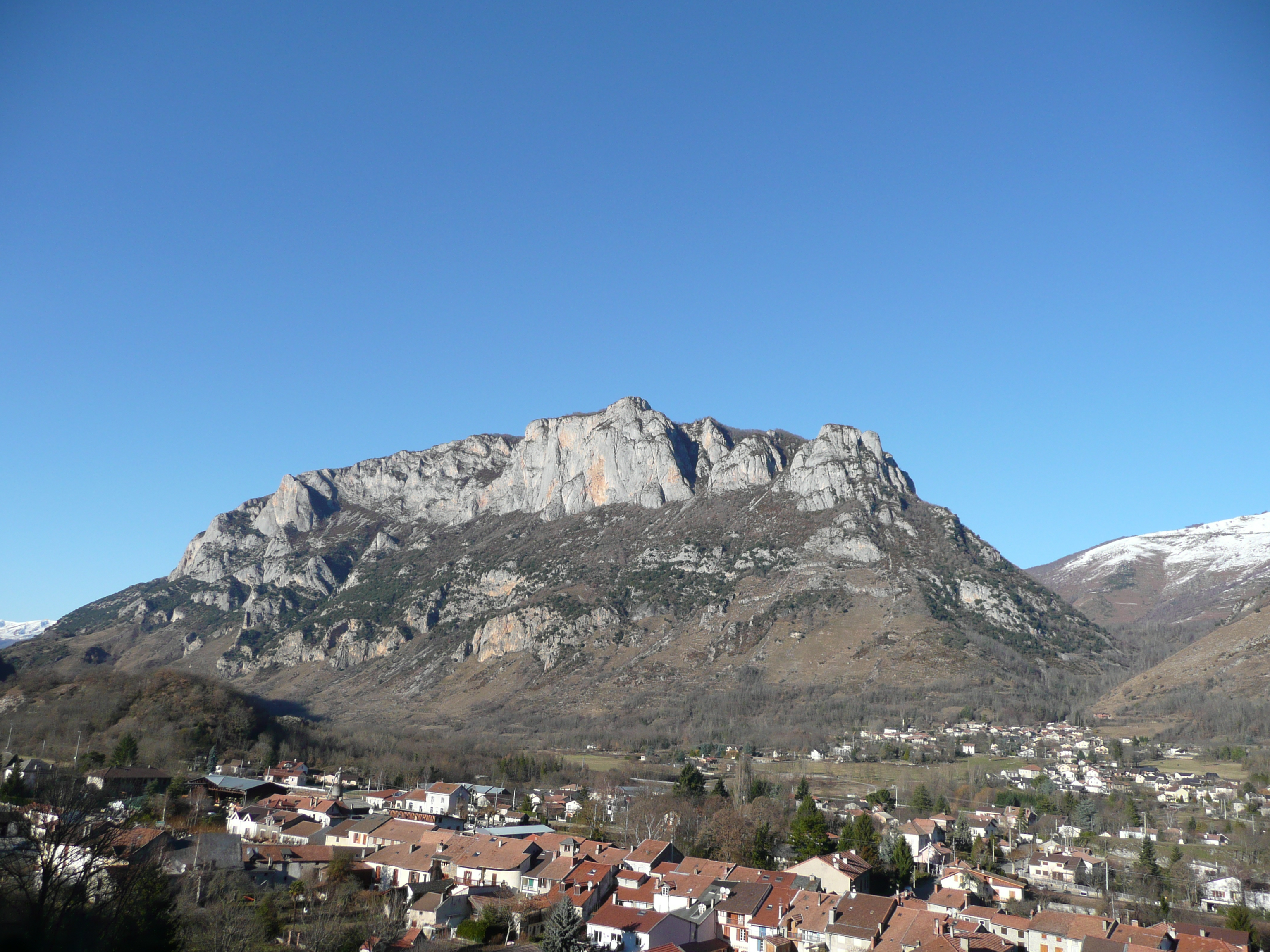 Le Quié (1484m), depuis Pech, Ariège, France